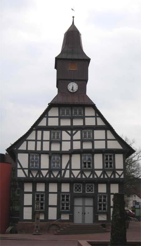 Uslar, historisches Rathaus.